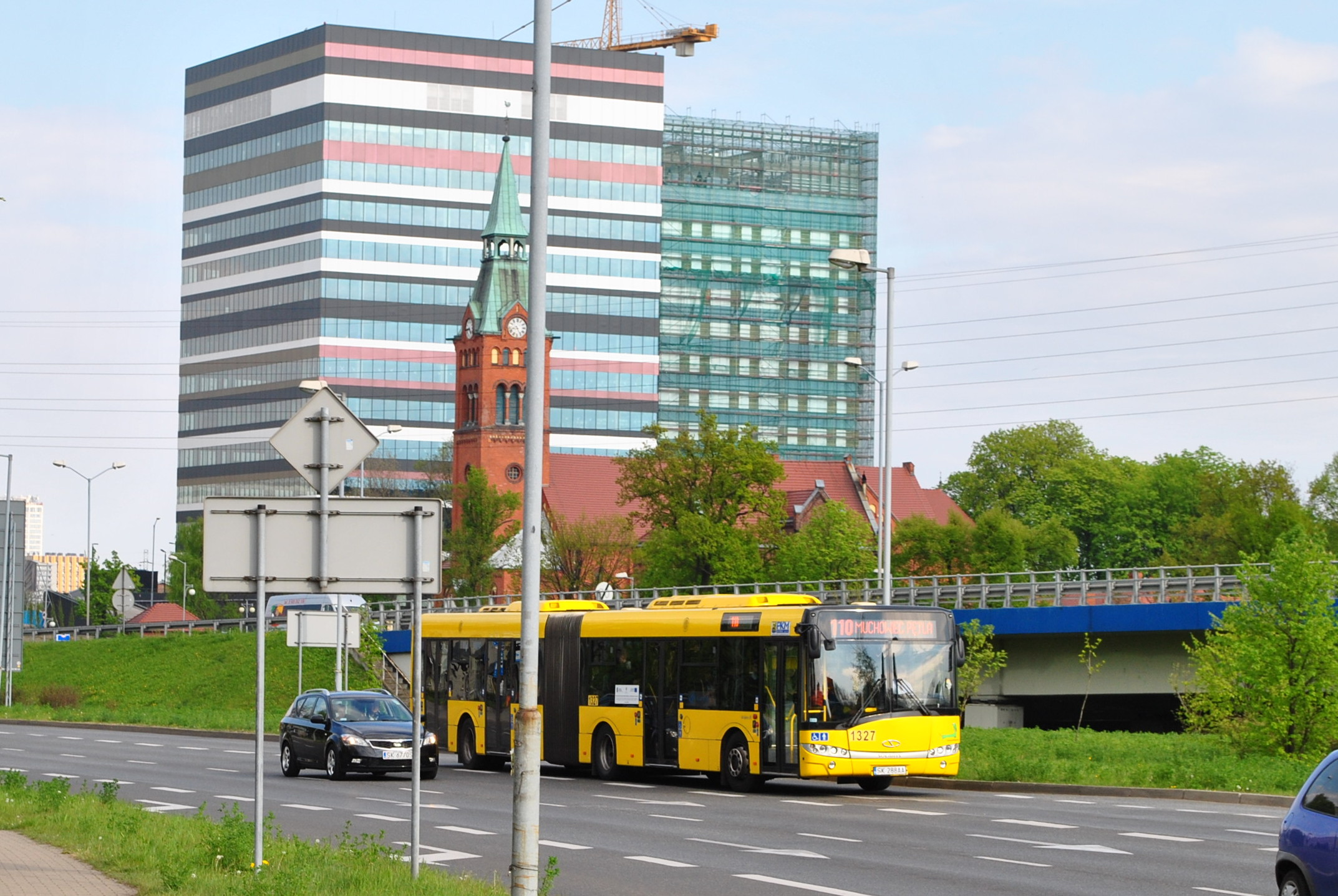 Katowice, Dąb. Ulica Chorzowska. W tle autobus Solaris Urbino, budynek Silesia Business Park oraz kościół pw. św. Jana i Pawła